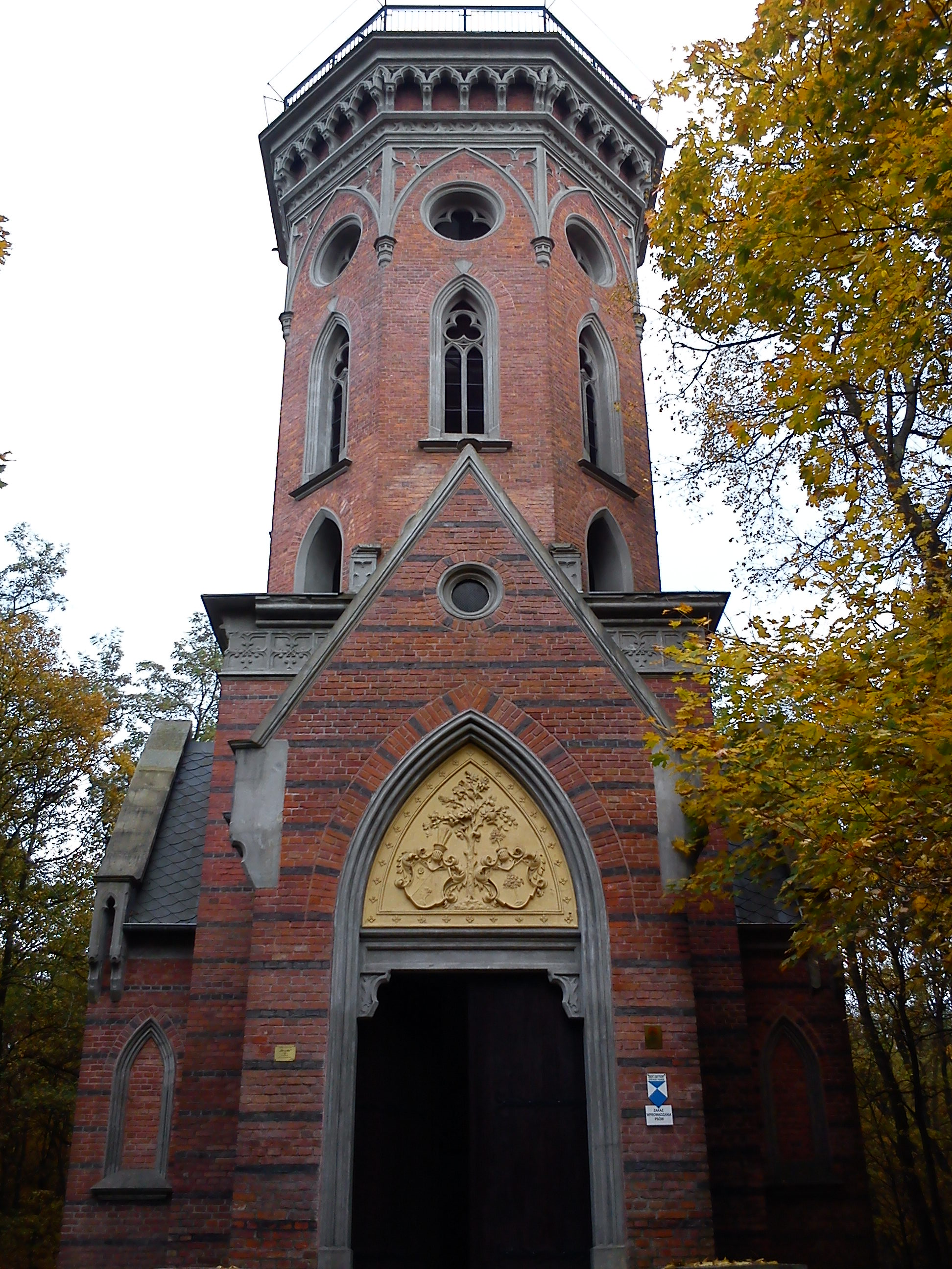 Szreniawa - Mauzoleum Bierbaumów, 1860 (na terenie Wielkopolskiego Parku Narodowego)